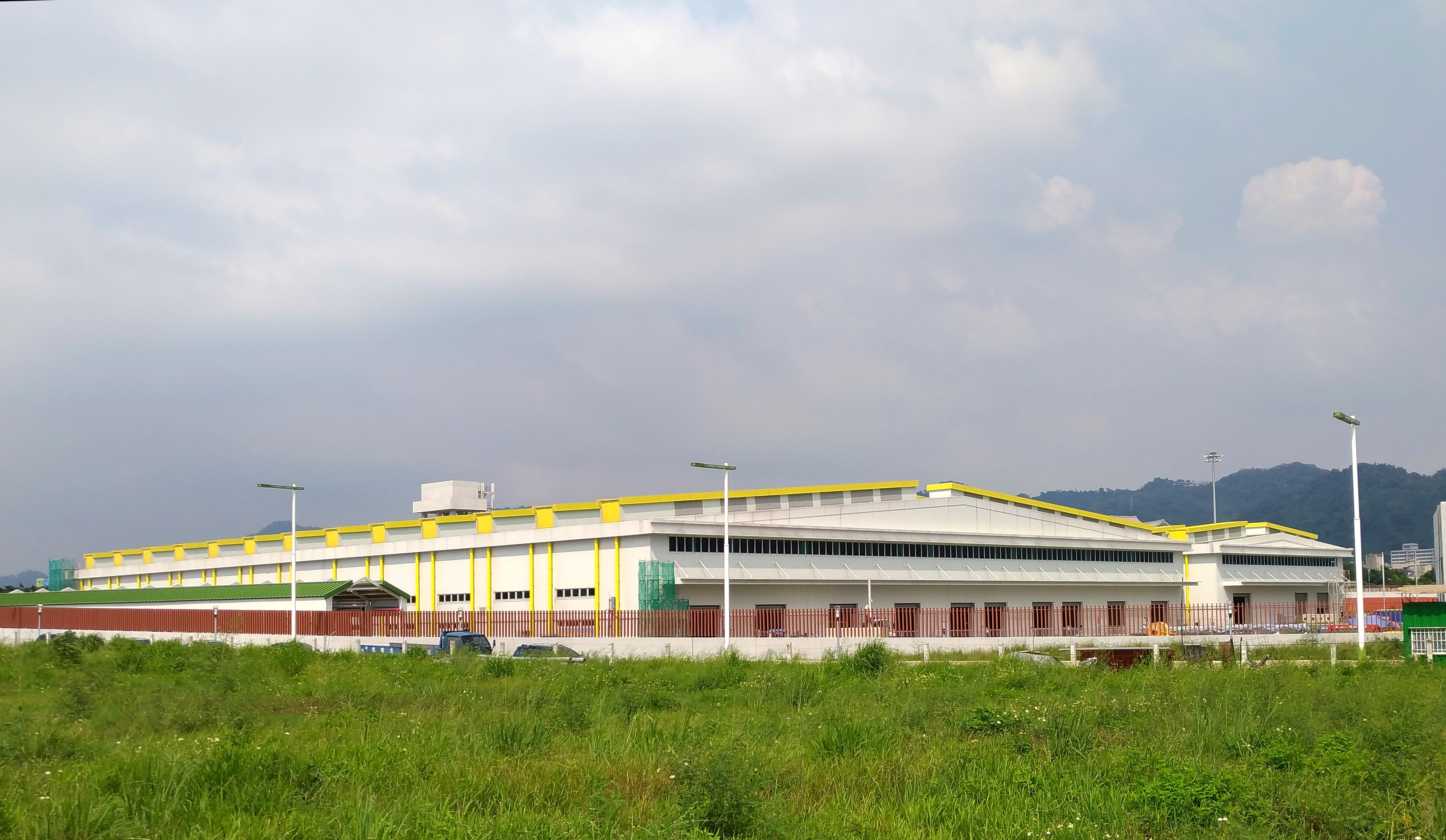 台中捷運綠線北屯機廠主維修廠